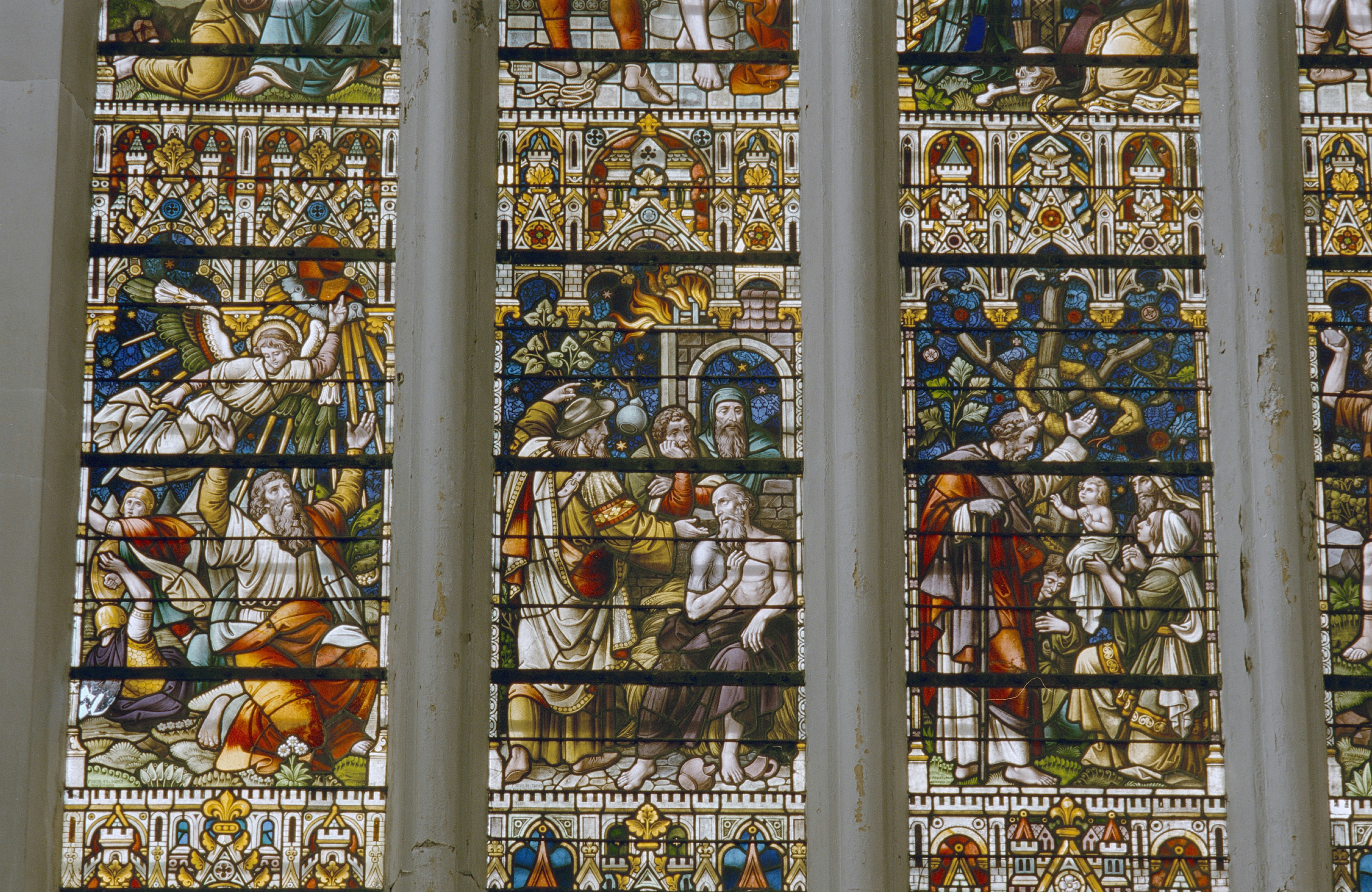 ROOMS-KATHOLIEKE KERK (ONZE LIEVE VROUWEKERK): INT. OVERZICHT GLAS IN LOODRAMEN, DETAILS